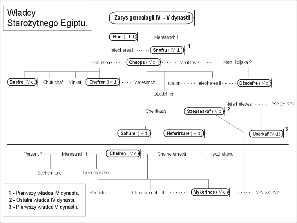 Starożytny Egipt - genealogia IV i V dynastii.